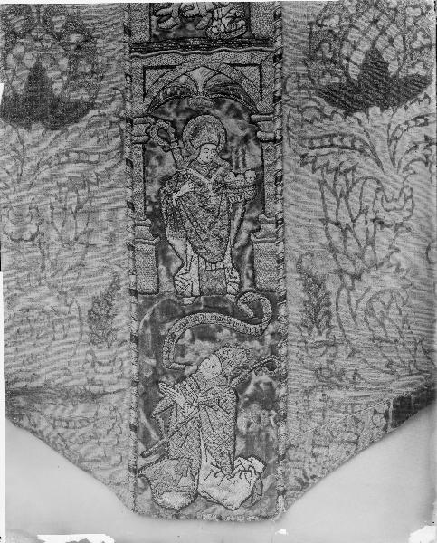 Mässhake, sammetsbrokad i grönt och guld, stort granatäpplemönster, italiensk, 1400-talets andra hälft. Infälld figurbård, broderier i guld och silke, Albert Pärlstickarens verkstad, 1482. Här längst ner Jakob Ulfsson, mässhakens donator. Kategori: (07) Textilier Mässhake, sammetsbrokad i grönt och guld, stort granatäpplemönster, italiensk, 1400-talets andra hälft. Infälld figurbård, broderier i guld och silke, Albert Pärlstickarens verkstad, 1482. Här längst ner Jakob Ulfsson, mässhakens donator.